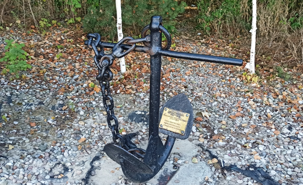 Kołobrzeg Jan Szymański 1932-1998 kotwica